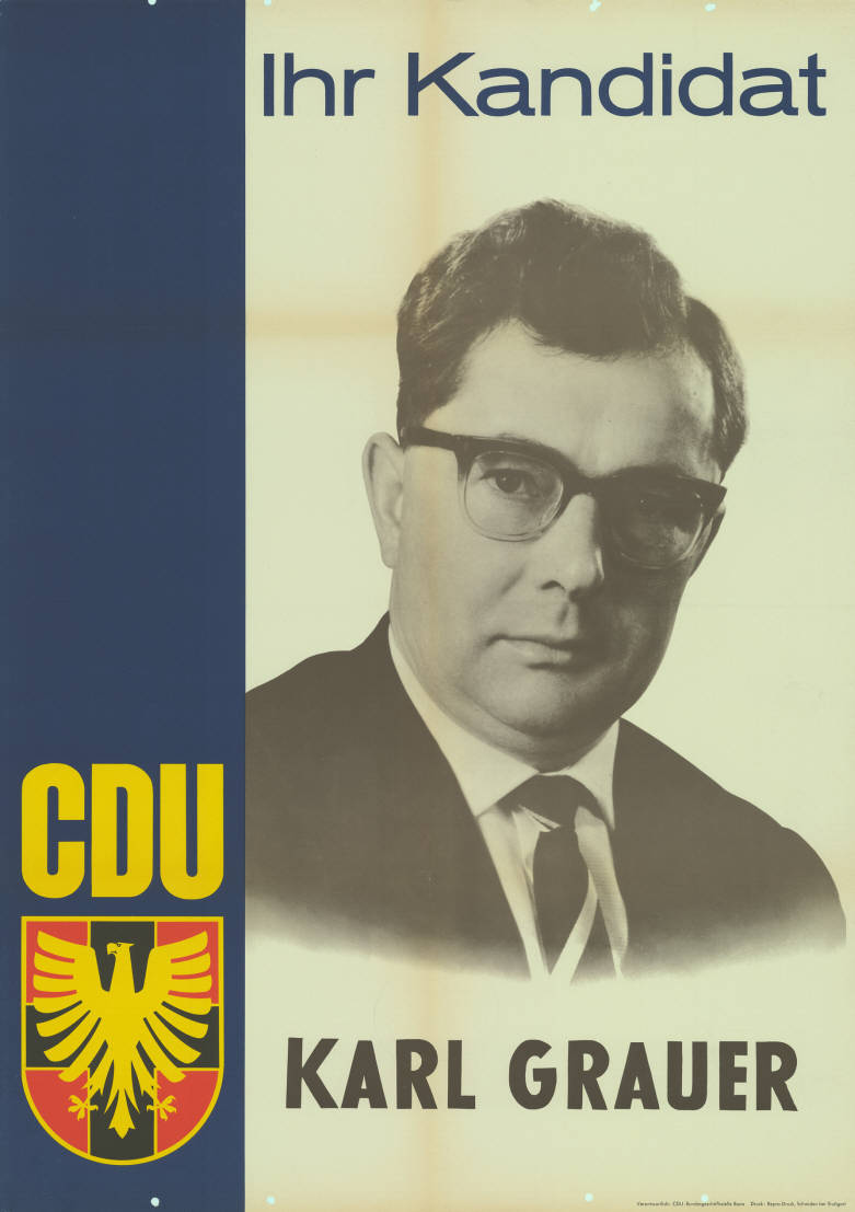 Ihr Kandidat CDU Karl Grauer Abbildung: Porträtfoto Plakatart: Kandidaten-/Personenplakat mit Porträt Auftraggeber: Verantw.: CDU-Bundesgeschäftsstelle Bonn Drucker_Druckart_Druckort: Repro-Druck, Schmiden bei Stuttgart Objekt-Signatur: 10-010 : 219 Bestand: Landtagswahlplakate Rheinland-Pfalz (10-010) GliederungBestand10-18: Landtagswahlplakate Rheinland-Pfalz (10-010) » CDU Lizenz: KAS/ACDP 10-010 : 219 CC-BY-SA 3.0 DE